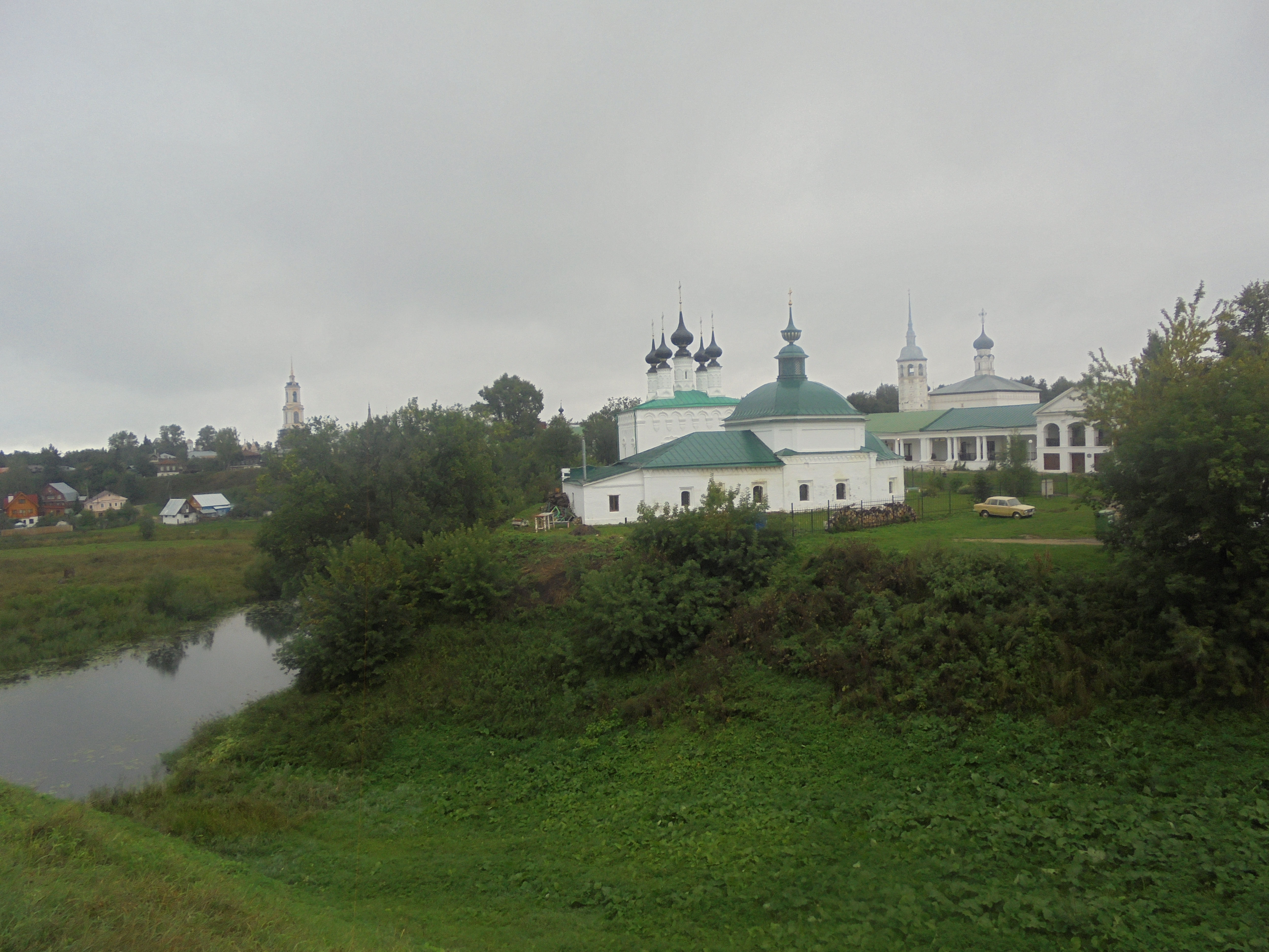 Вид на древний город Суздаль